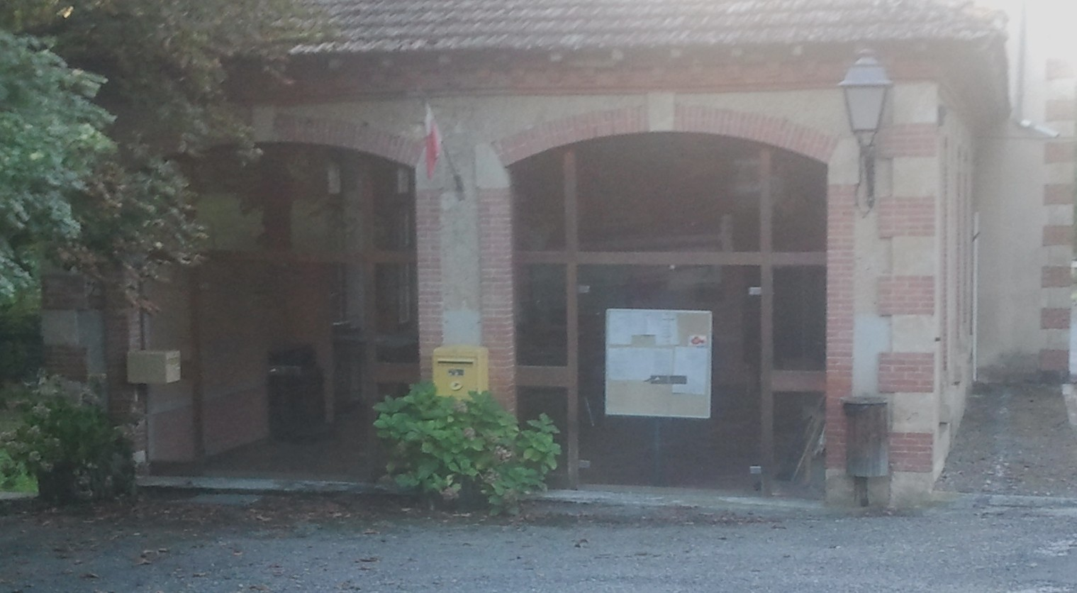 Mairie de Lamaguère